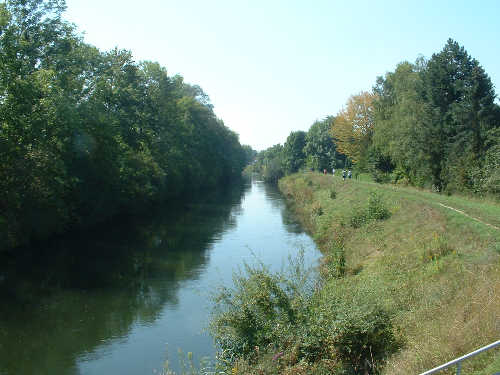 Amperüberleiter bei Moosburg.Amper-Überführungskanal